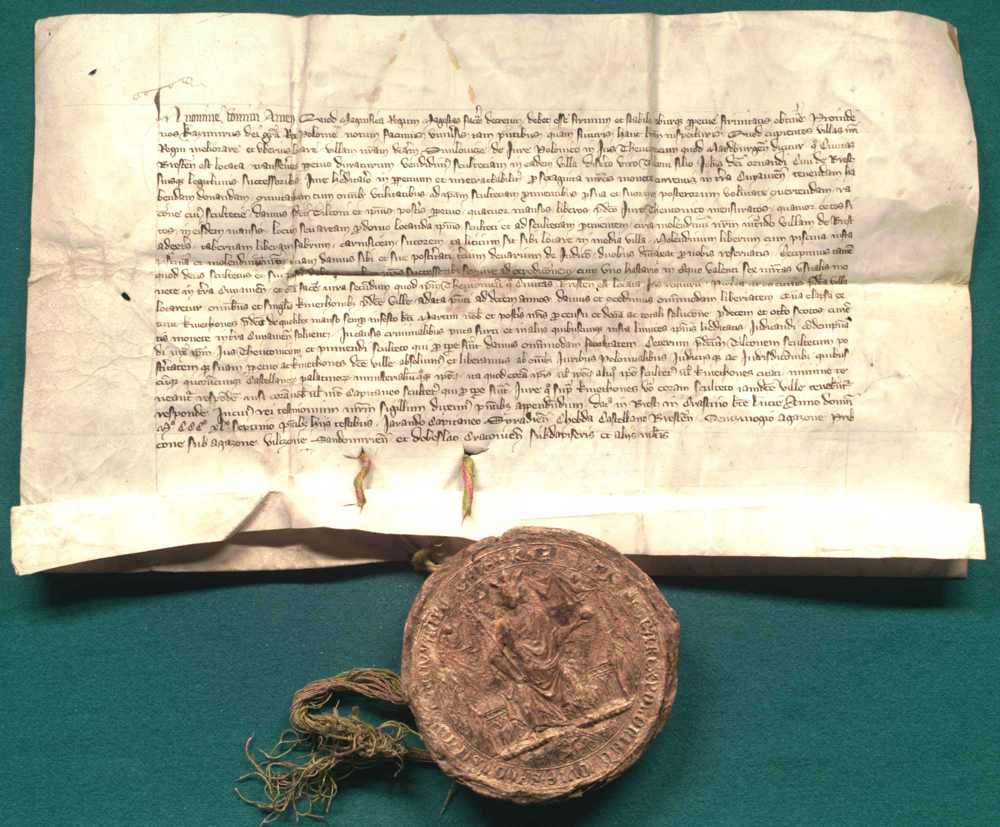 Kazimierz, król polski, nadaje wsi Śmiłowice prawo magdeburskie i sprzedaje Tylkowi, synowi Jana, mieszczaninowi brzeskiemu sołectwo za 60 grzywien. Język: łac. Opis zewnętrzny: oryg., 1 k. pergaminowa, 43 x 25,3 + 6,5 cm; pieczęć na sznurze